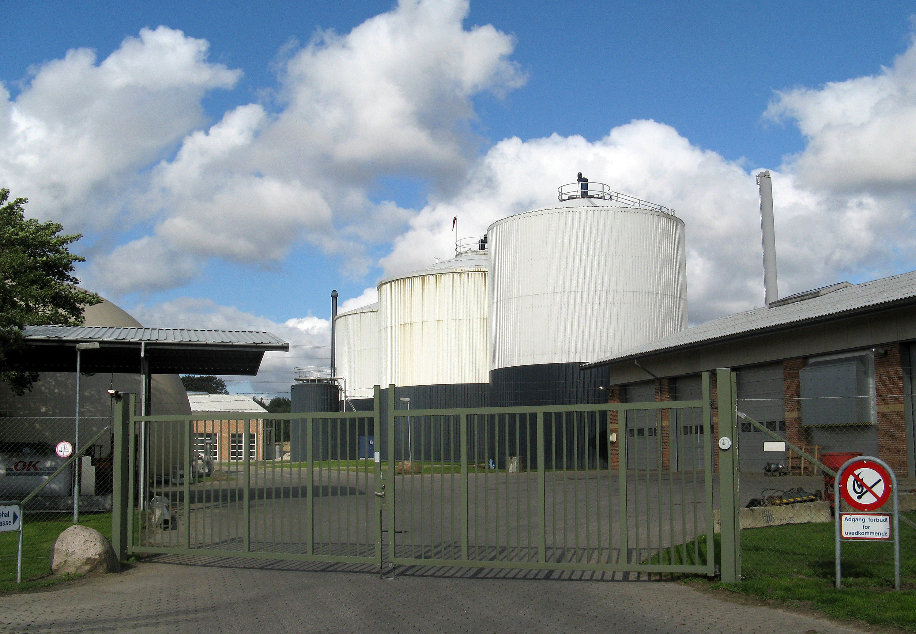 Biogasanlæg ved Spørring nord for Århus (Denmark); Aktieselskabet Bånlev Biogas. Bånlev står for Biogas Århus Nord Leverandørforening, - tidligere Århus Kommunes Biogasanlæg